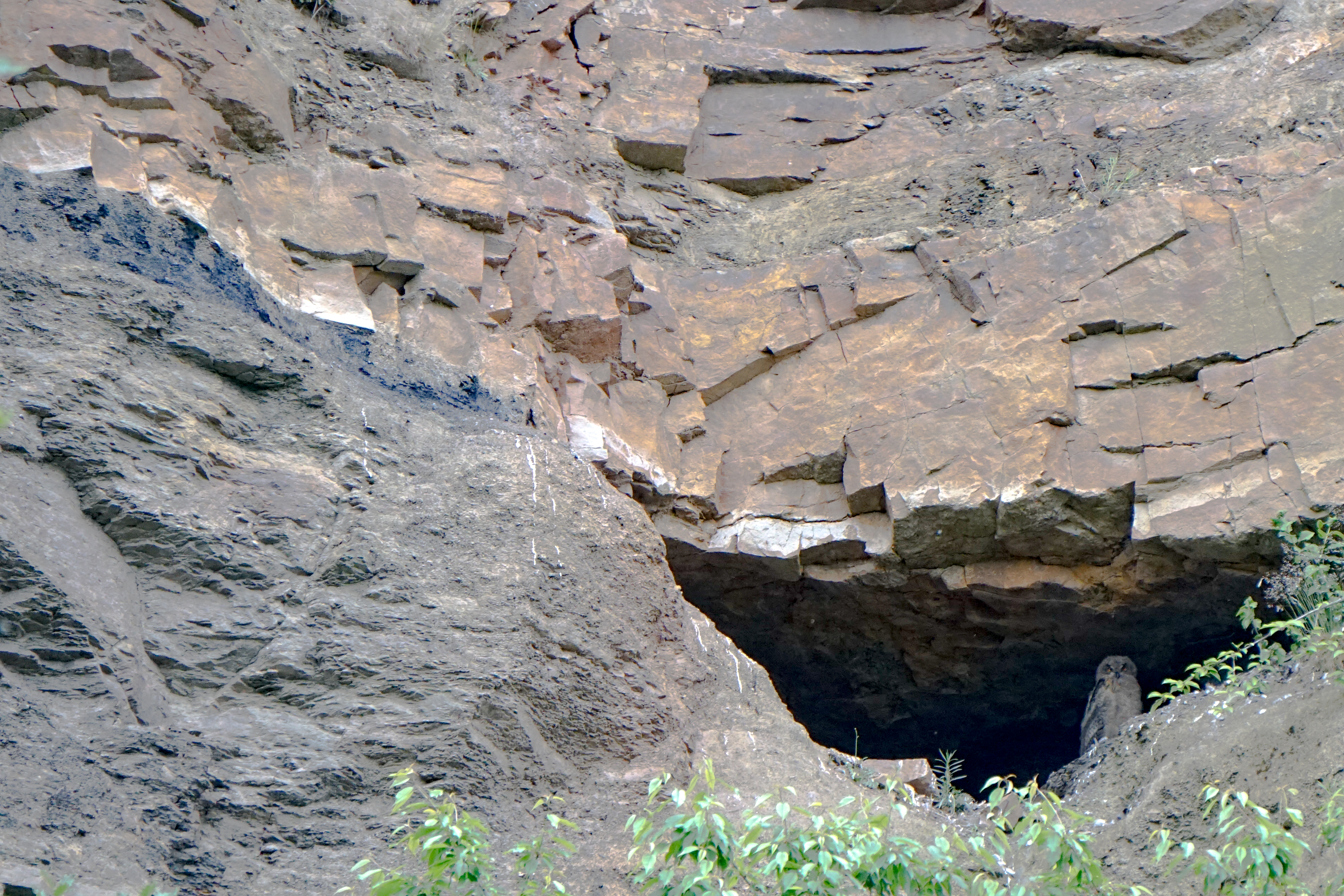 Naturdenkmal (ND 2.3.20): Geologischer Aufschluss im Steinbruch Dünkelberg im Muttental in Witten. Links das freigetretene Flöz Geitling 3, rechts ein junger Uhu (Bubo bubo)